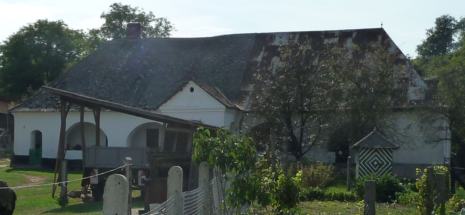 Az egykori Lenkey-kúria Bódvalenkén